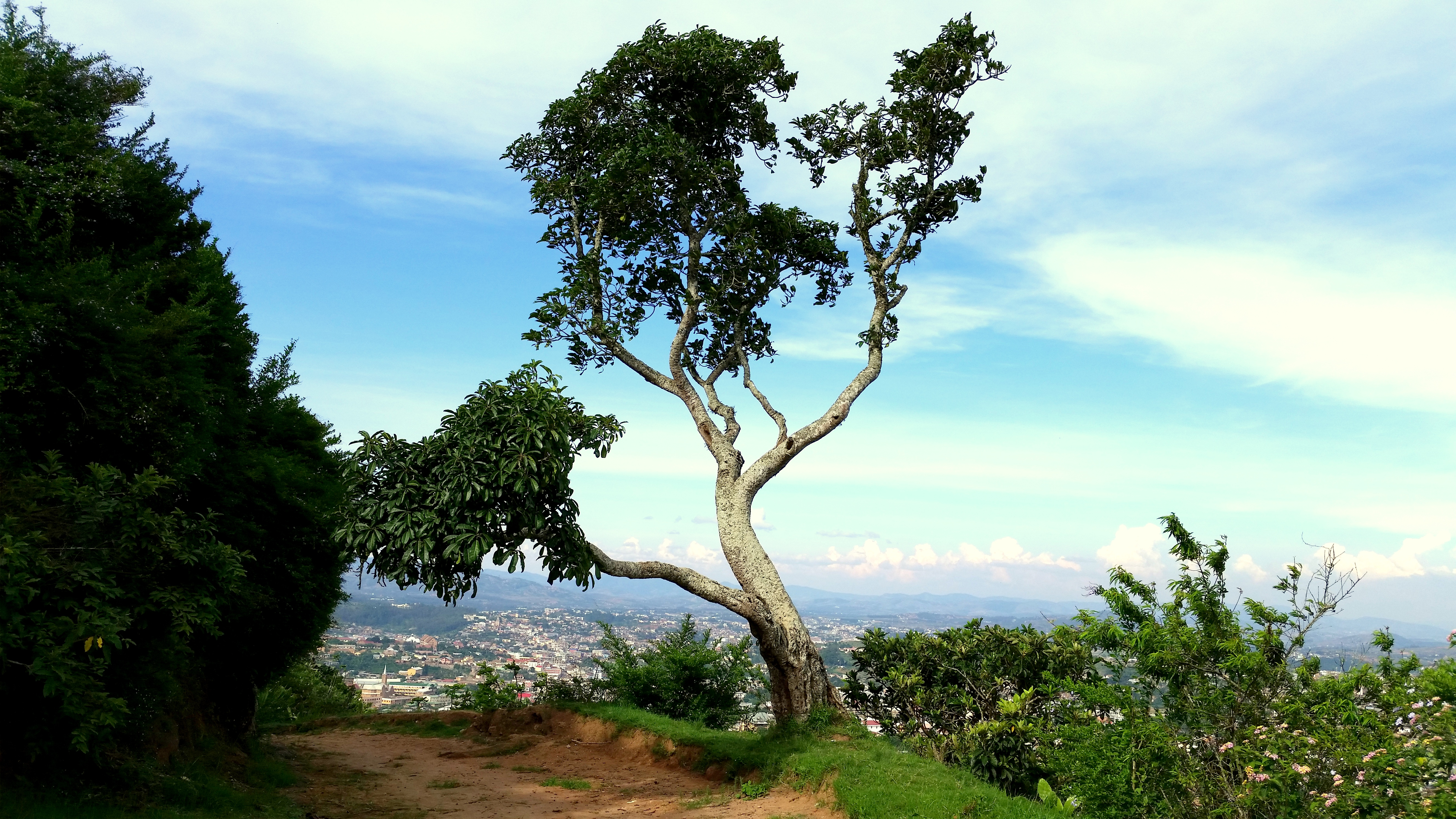 Fianarantsoa, Madagascar This is an image with the theme "Play" from: Madagascar